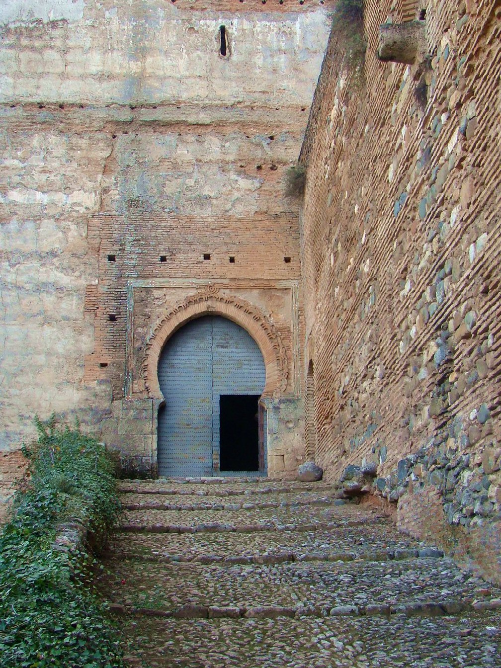 Acceso a la Puerta de las Armas desde la ciudad musulmana